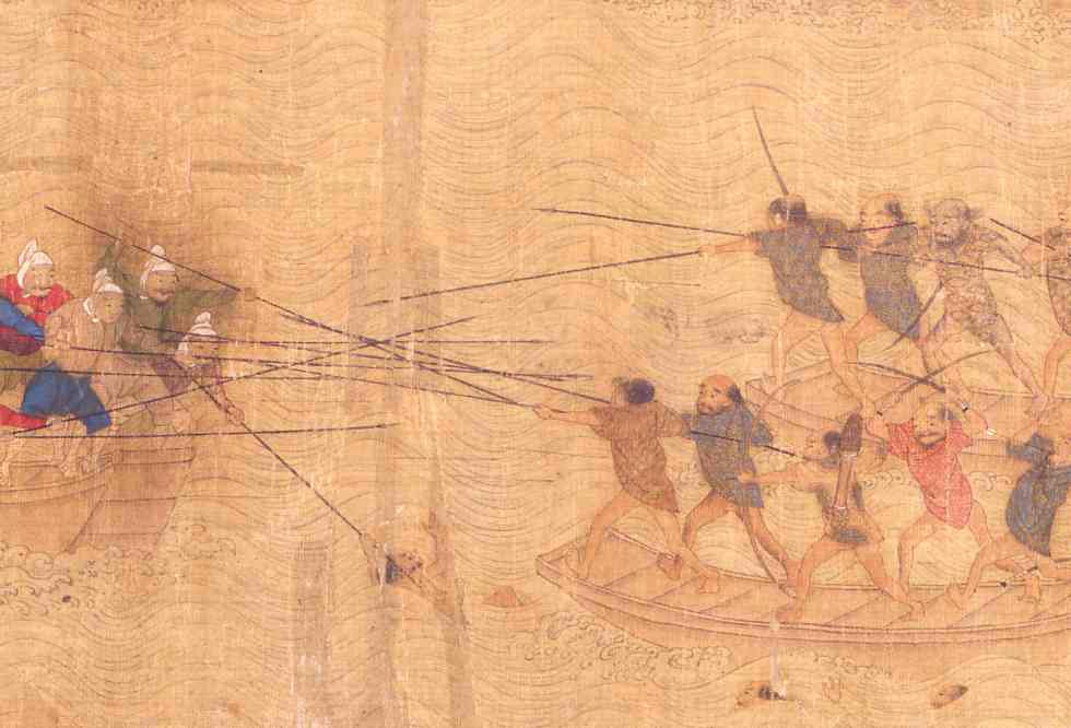 вокоу